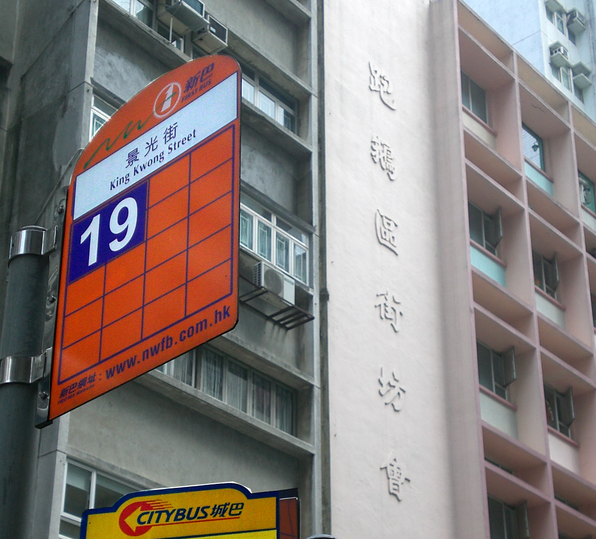 香港跑馬地景光街跑鵝區街坊會學校